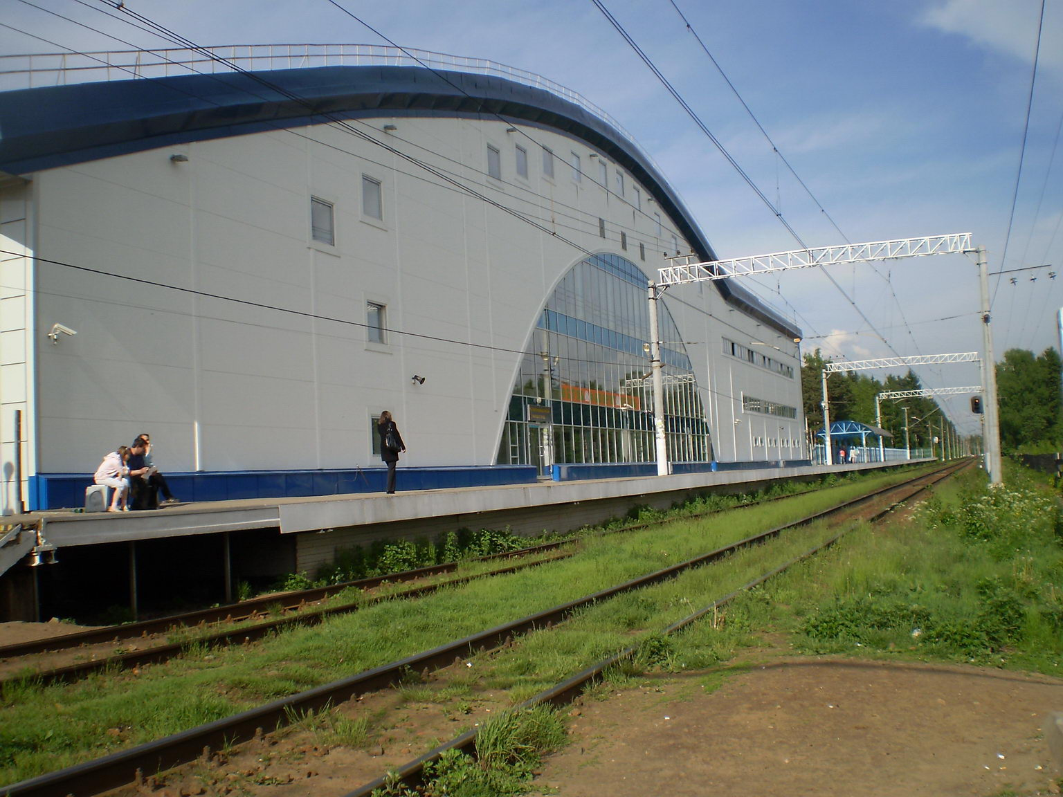 Вокзал во Всеволожске